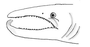 Kroglakshoved, bemærk den store krog på underkæben.